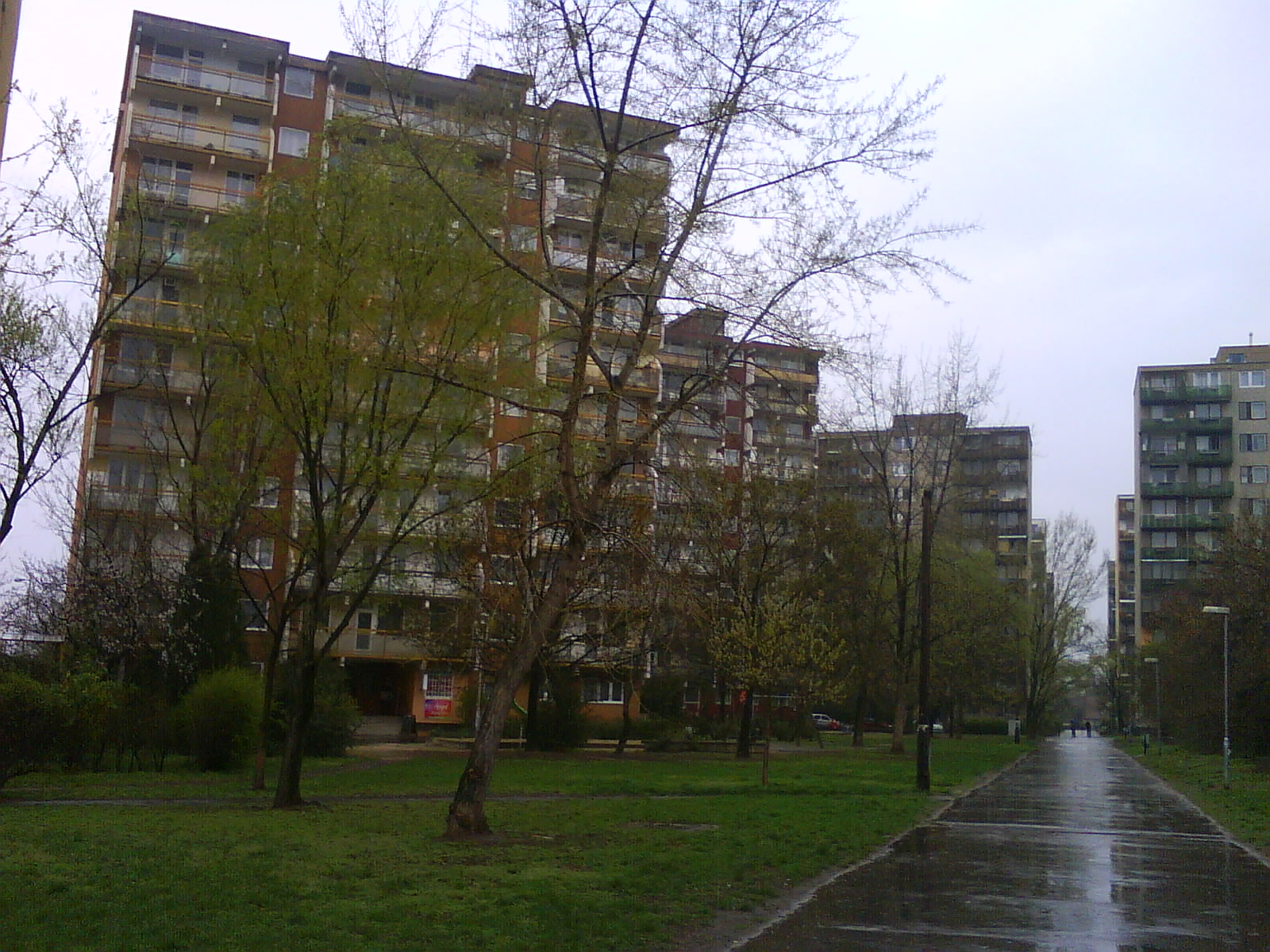 Mádi sétány, Ungarn